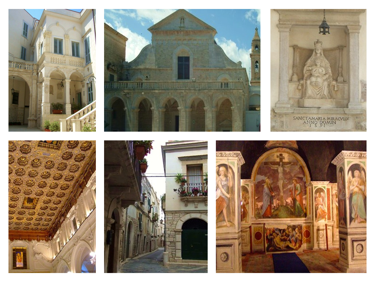 Alcuni monumenti della città di Andria